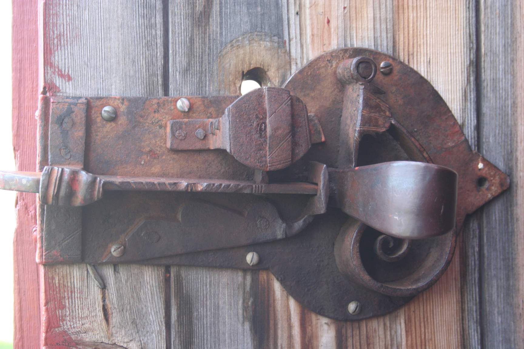 Årdal Alte Kirche, Tuerschloss